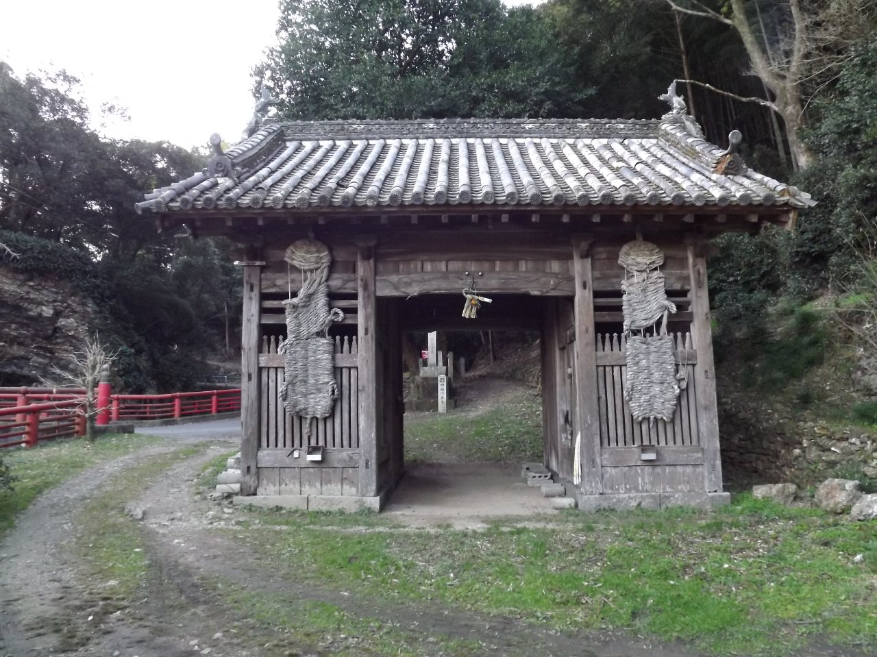 恩山寺の山門